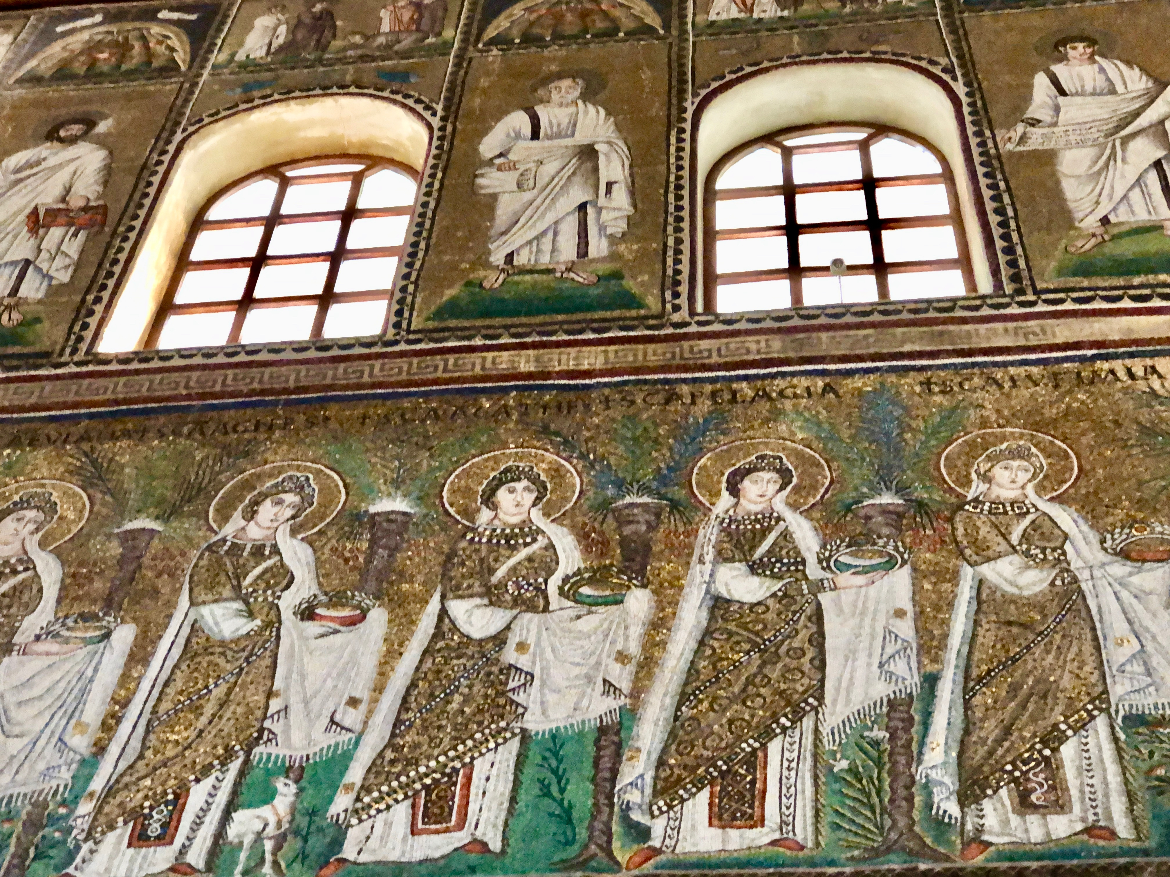 Italie, Ravenne, basilique Sant'Apollinare Nuovo, mosaïque du cortège des vierges